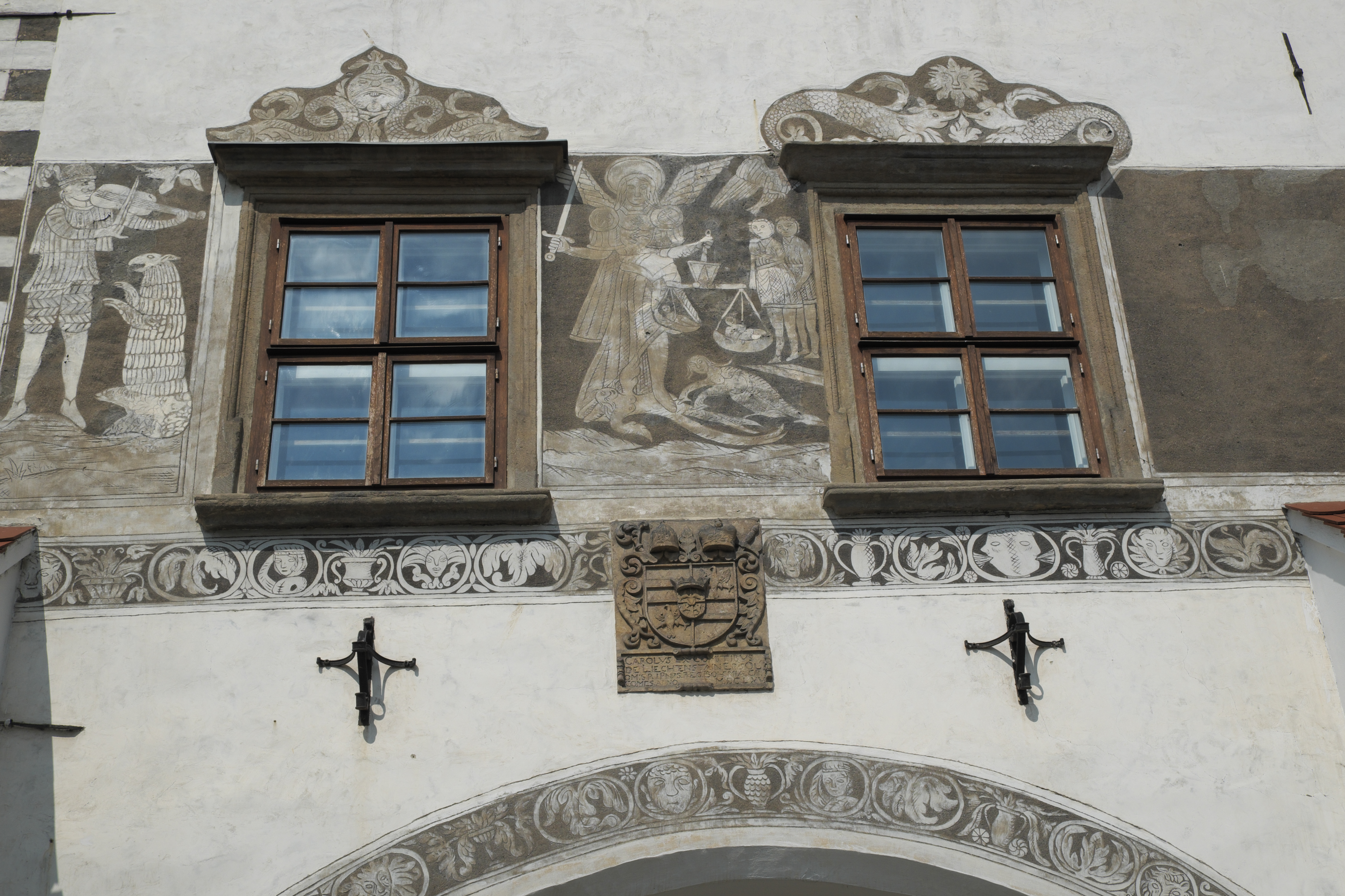 Gebäude, Regentský dům, am Marktplatz in Kroměříž in der Region Zlin in Tschechien